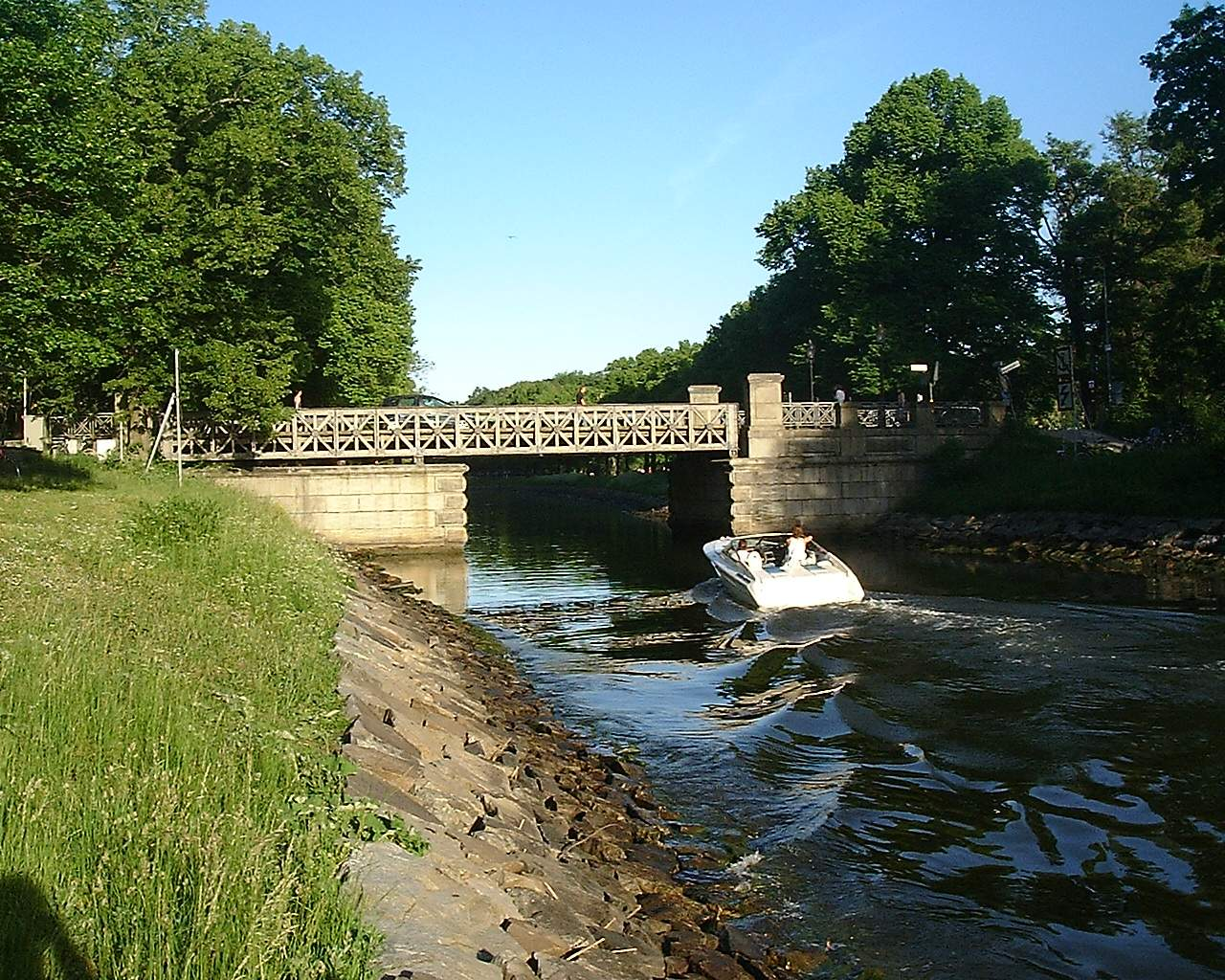 Djurgårdsbrunnsbron